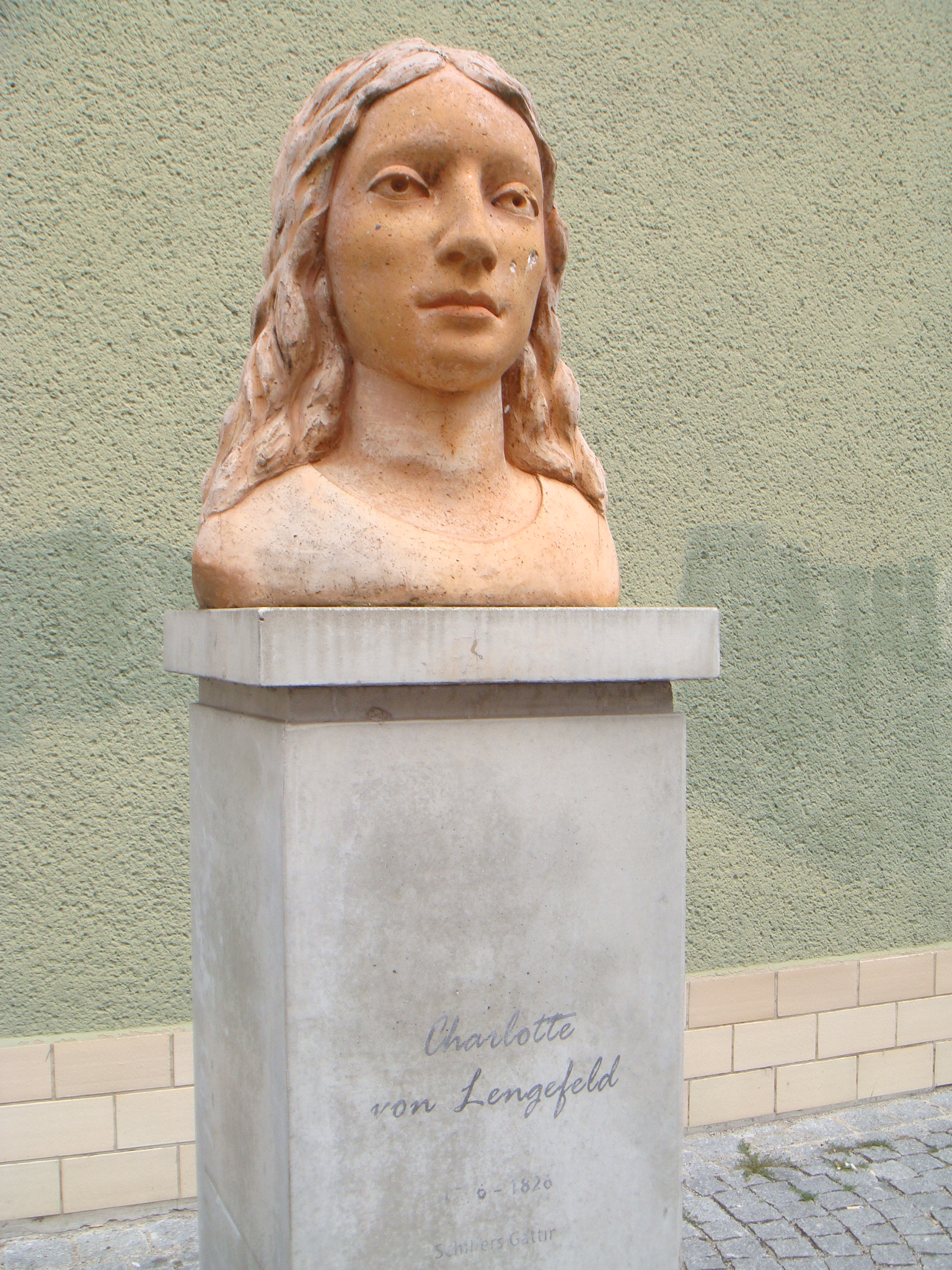 Porträtbüste der Charlotte von Lengefeld in Rudolstadt